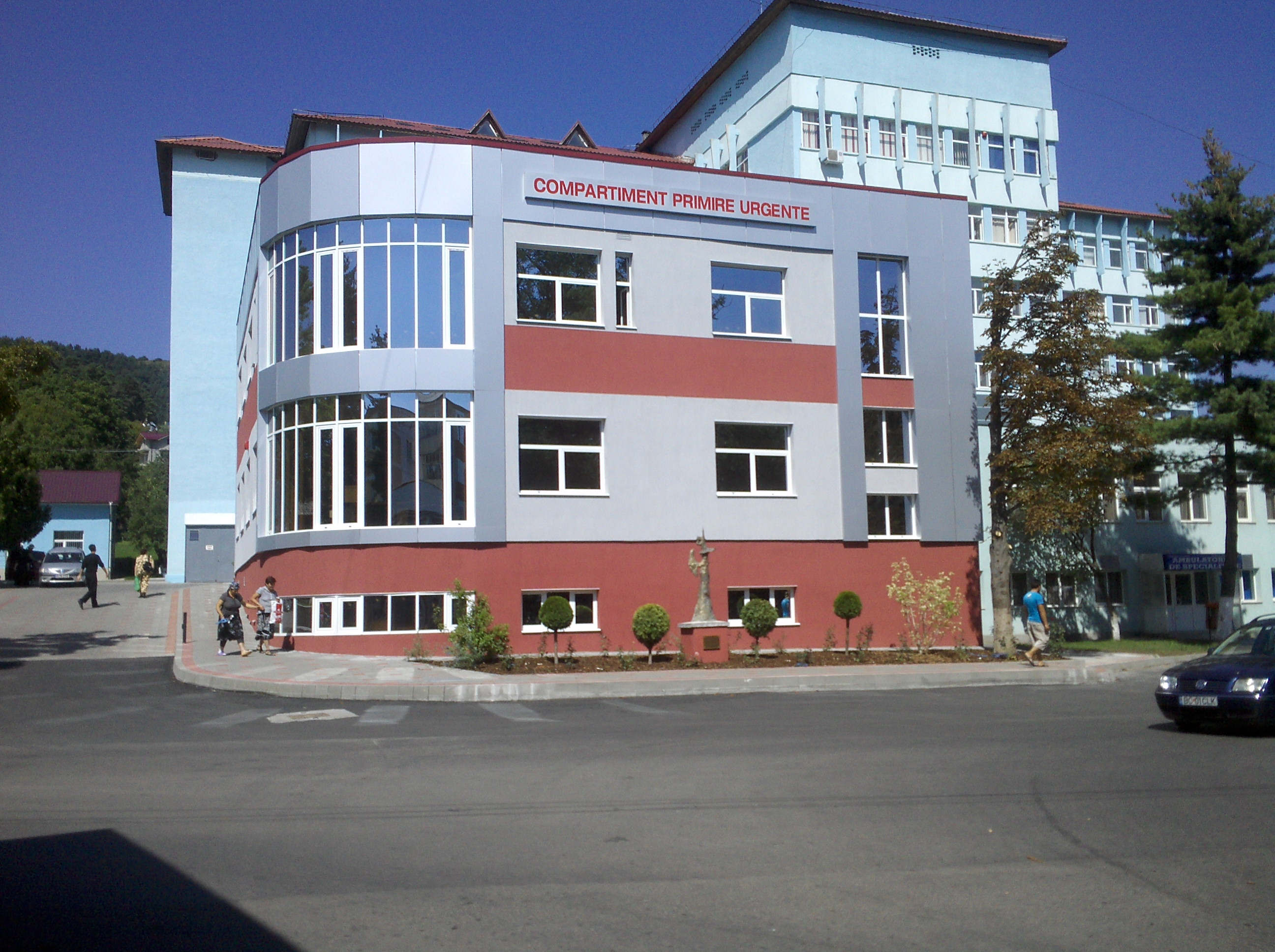 Hospital de Moineşti.